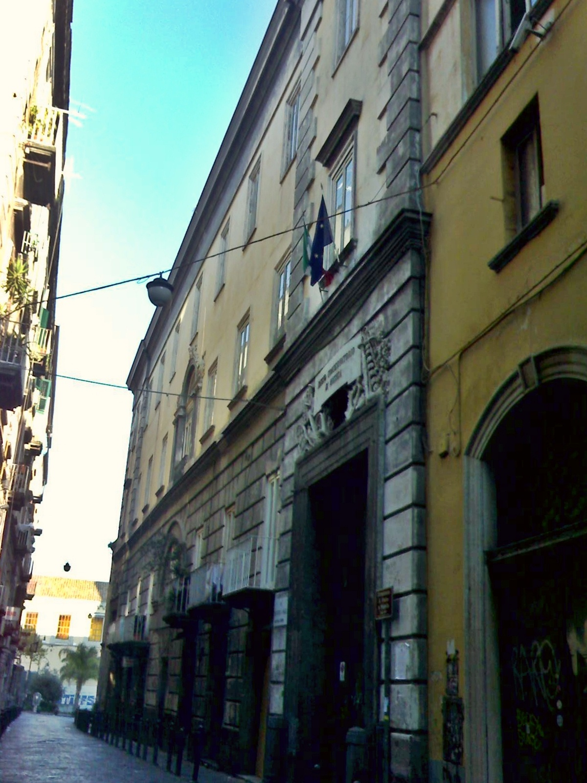 Palazzo del Conservatorio di San Pietro a Majella (Napoli)